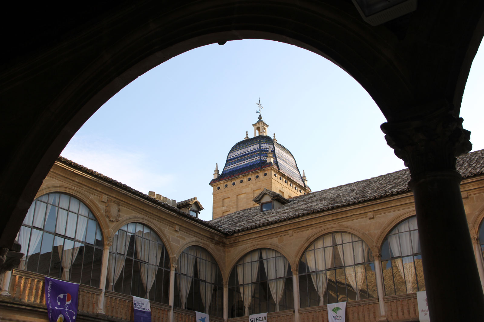 Une des quatre tours de l'Hospital de Santiago à Ubeda (Espagne). Une réalisation de l'architecte Andrès de Vandelvira (1562-1575).